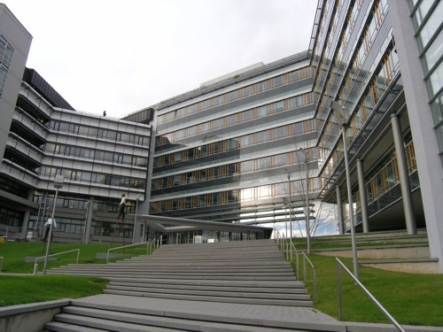 Standort der SV SparkassenVersicherung an der Löwentorstraße 65 in Stuttgart-Bad Cannstatt